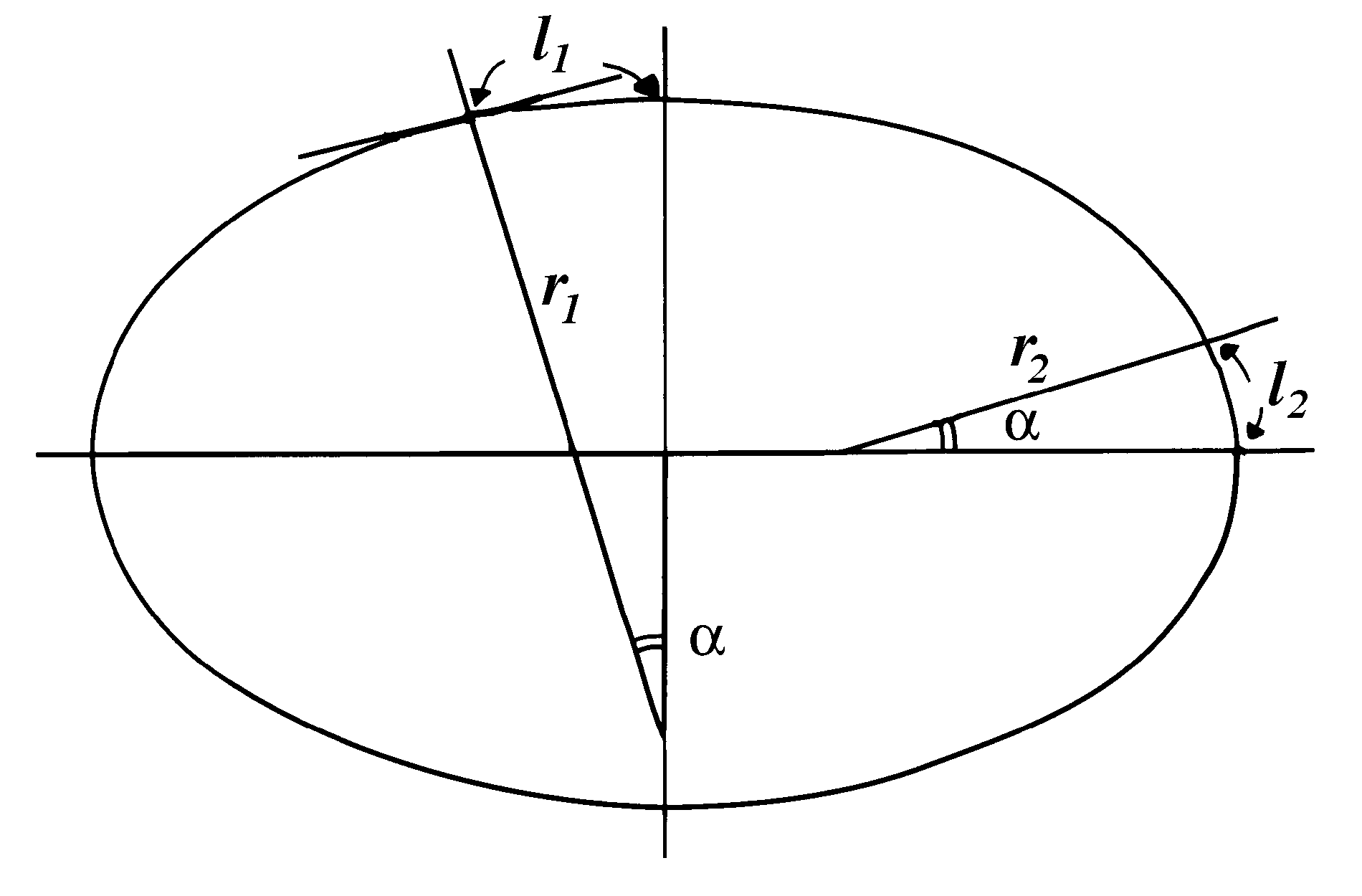 Variation de la longueur du degré d'arc en fonction de la latitude sur un ellipsoïde de révolution.